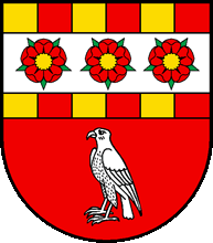 Wappen von Cugy Kanton Freiburg Schweiz